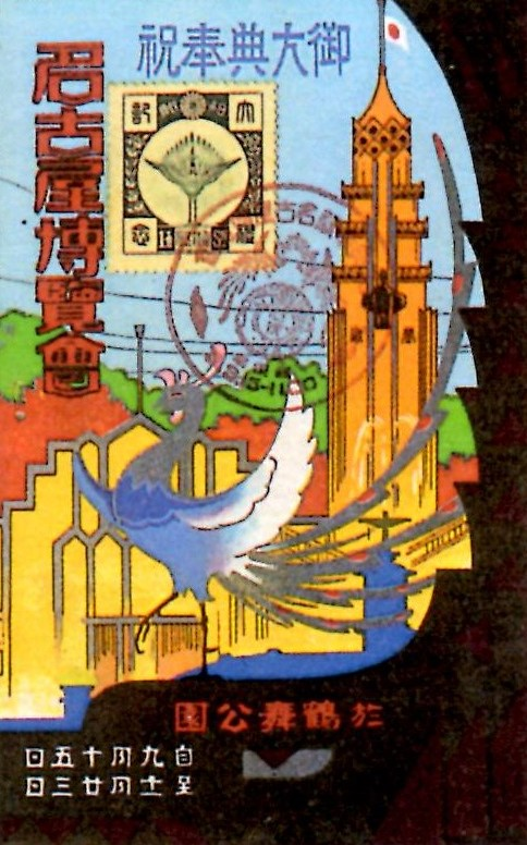 1928年に鶴舞公園で開催された御大典奉祝名古屋博覧会のポスター。